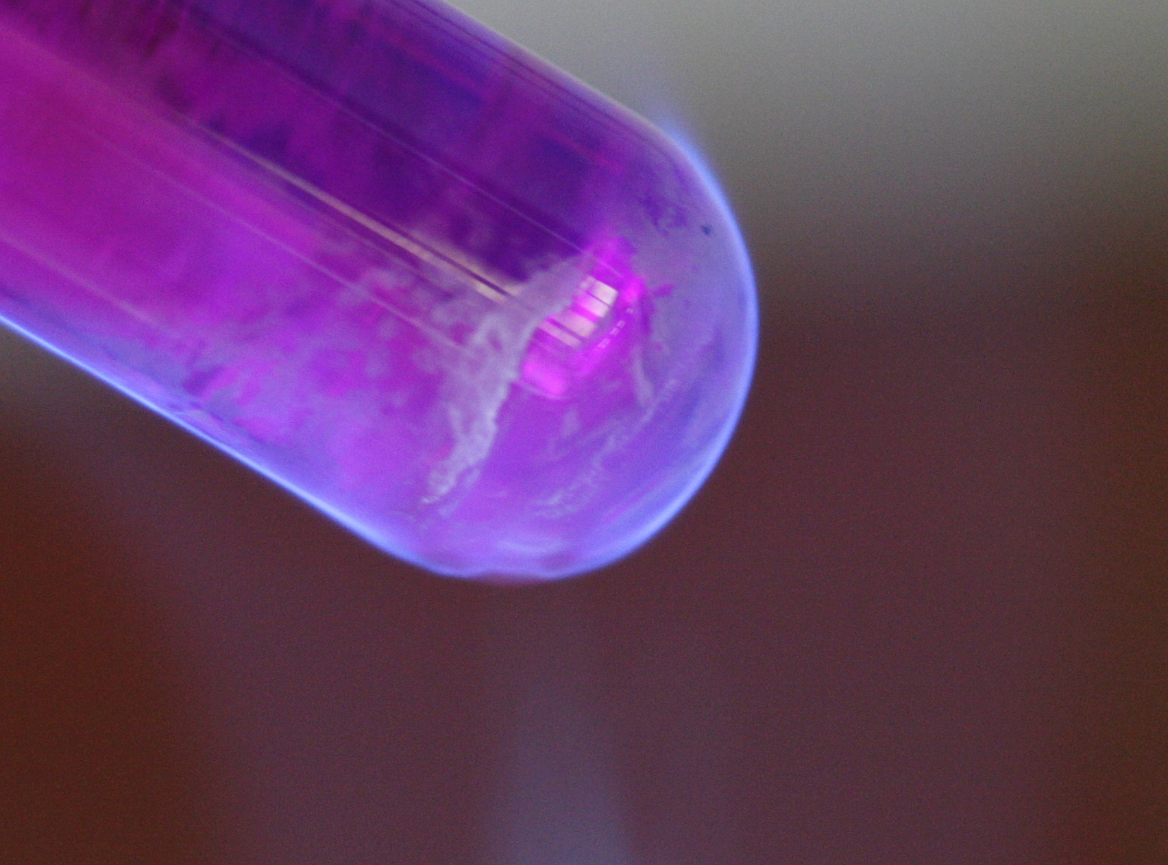 Zinnleuchtprobe. Bei Anwesenheit von Zinn ist eine deutliche blaue Lumineszenz am Reagenzglas zu erkennen. Das Reagenzglas wurde - um dieses Leuchten besser sichtbar zu machen - mit einer verdünnten Kaliumpermanganat-Lösung befüllt.